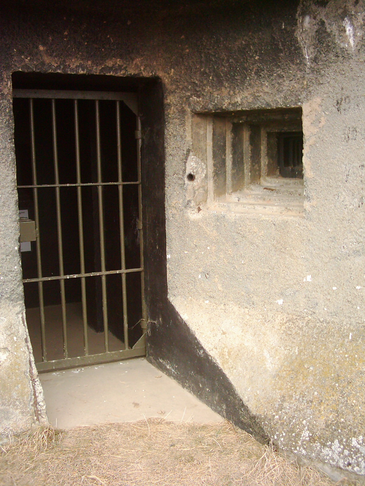 Ochranná střílna pěchotního srubu OP-S 27 Paletovo pole